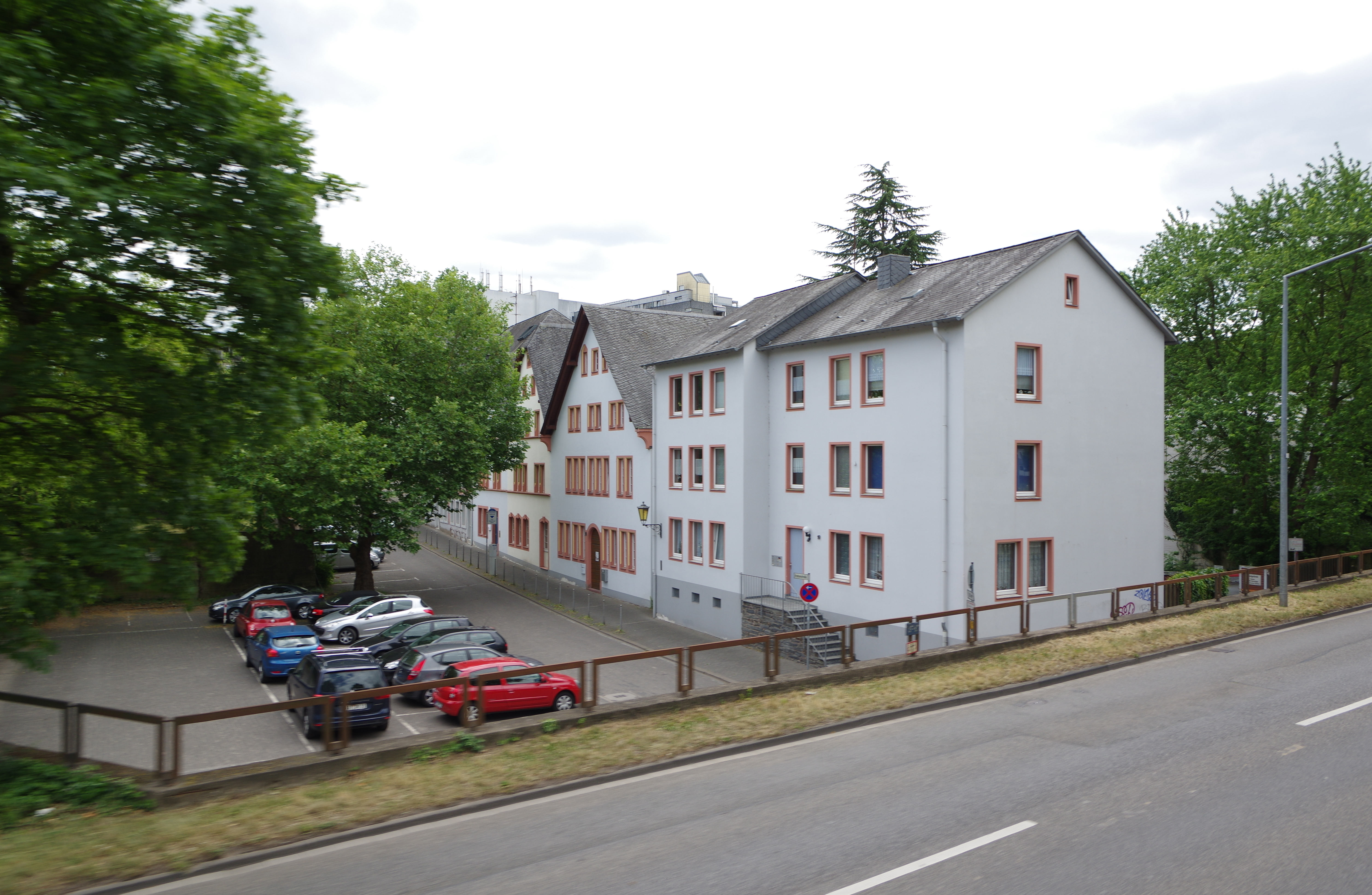 Trier, unterer Teil der Krahnenstraße vom Krahnenufer aus gesehen